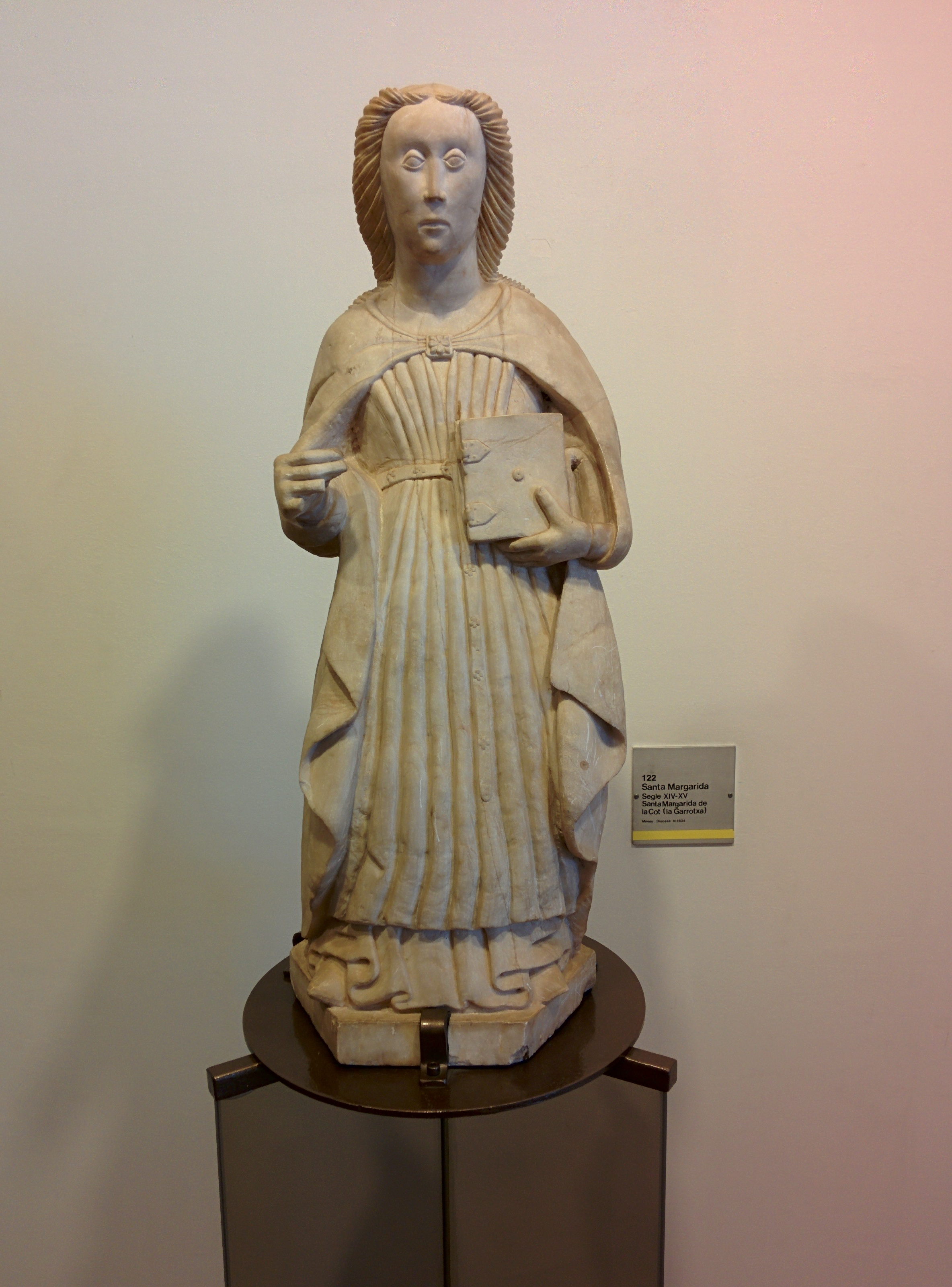 Església de Santa Margarida de Sacot (Santa Pau)